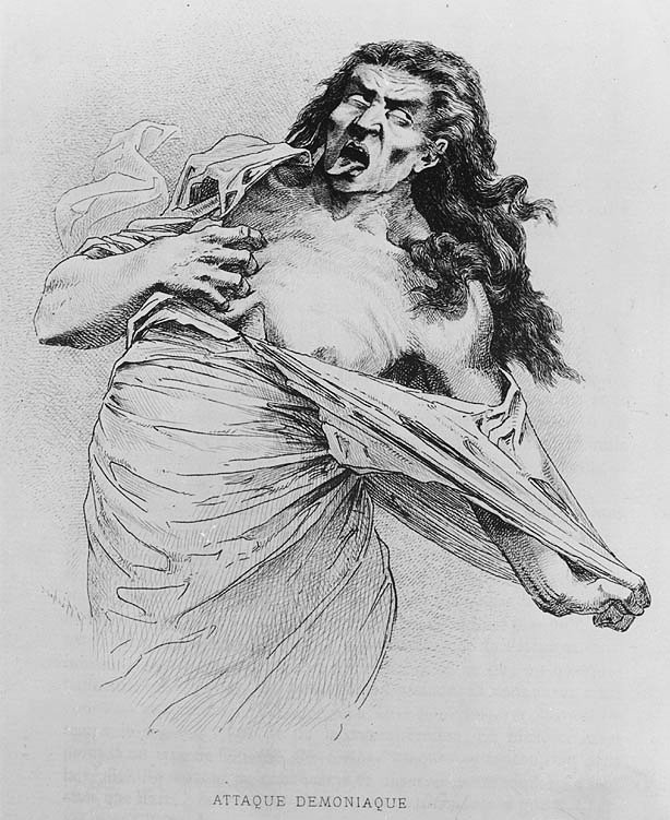 Paul Richer, Historischer Anfall (Attaque demoniaque), um 2010 Anton Kozatchkov; Kreide auf Papier, 31 x 21,5 cm.